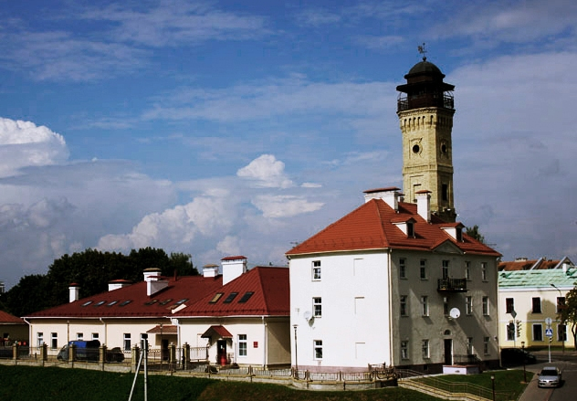 Пажарнае дэпо з вежай і былымі каралеўскімі стайнямі, вул. Замкавая, 19. Гродна, Бедарусь.